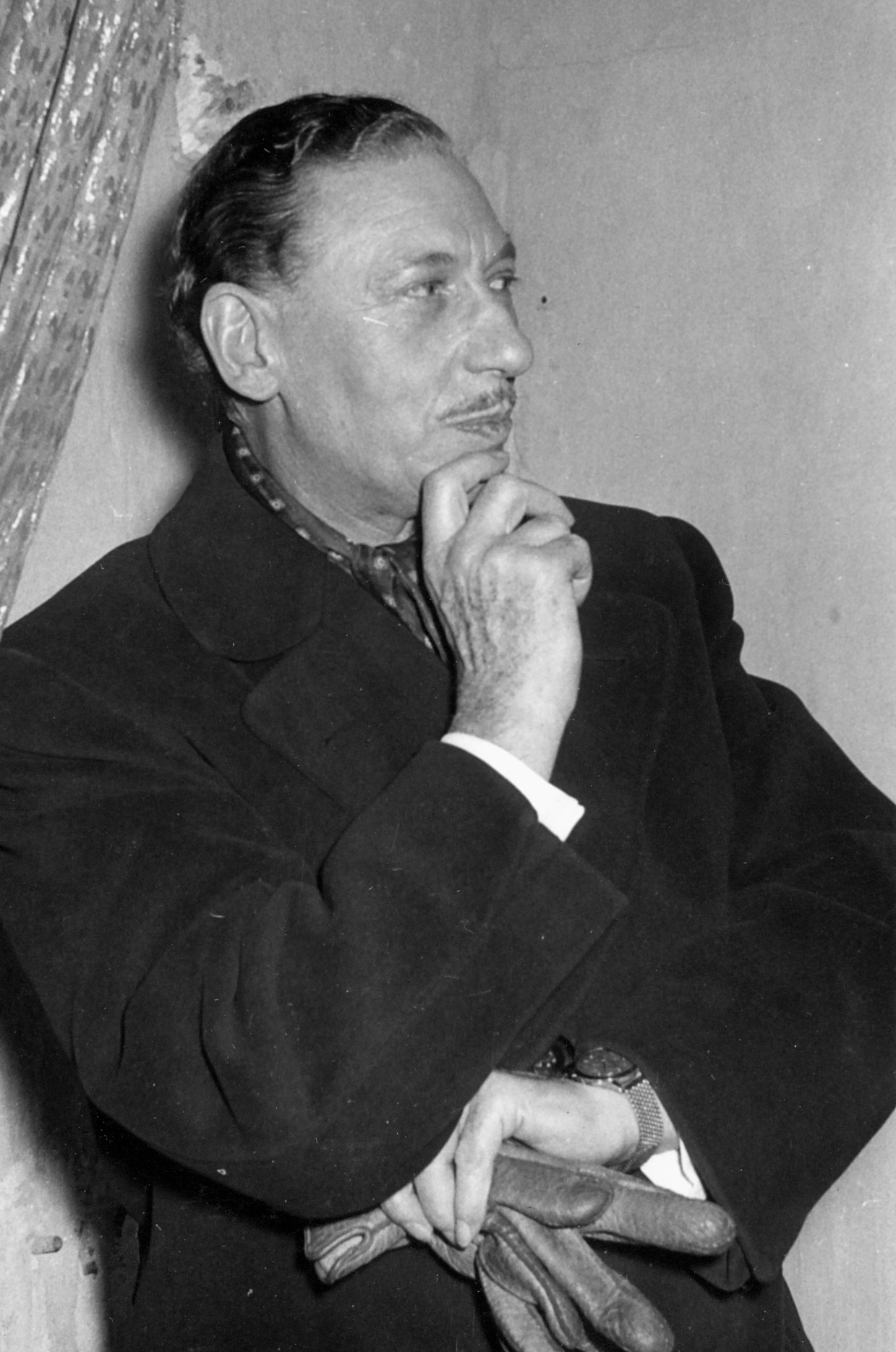 Der Schauspieler Willy Birgel am Rande einer Presseveranstaltung in Frankfurt am Main